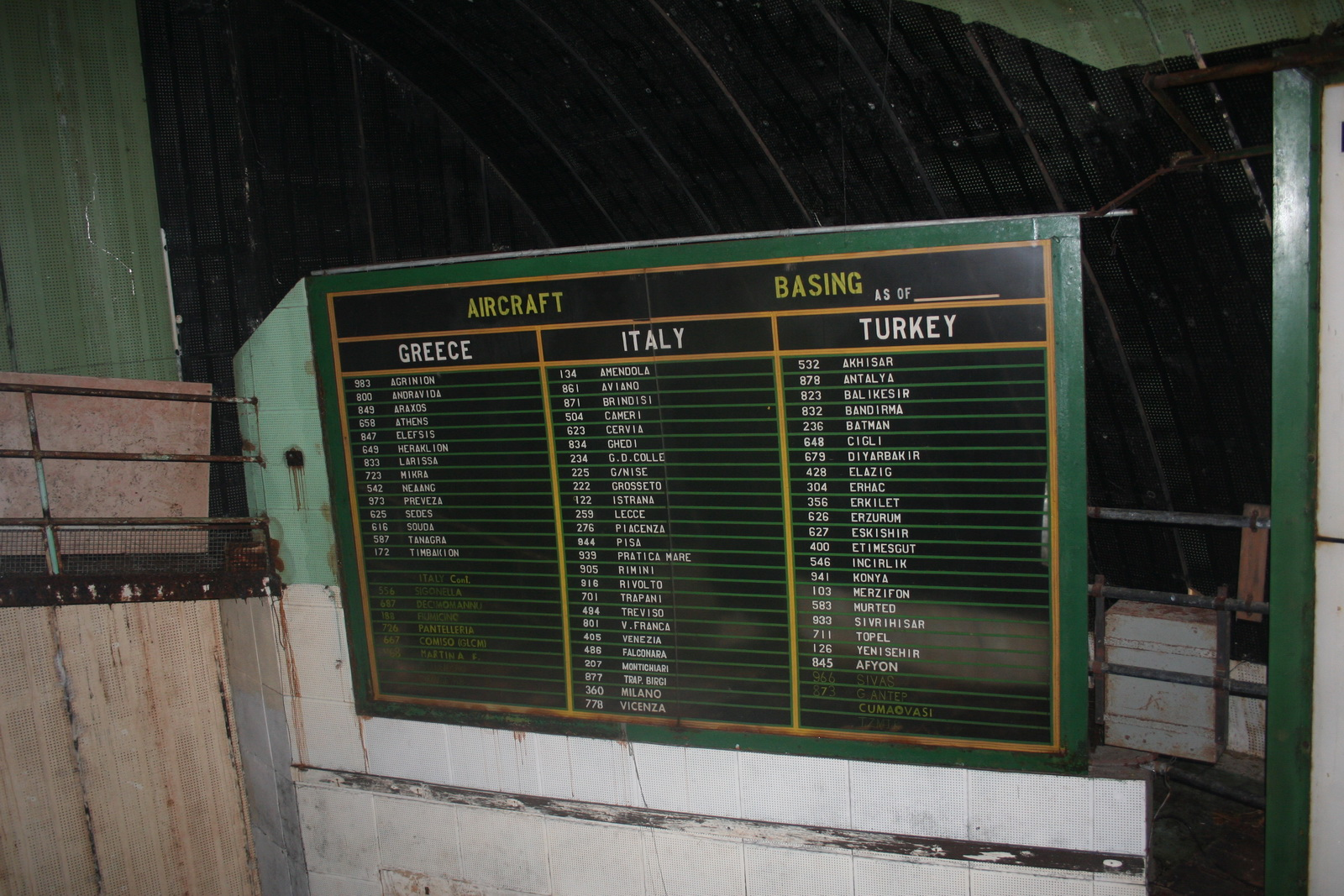 Basi aeree